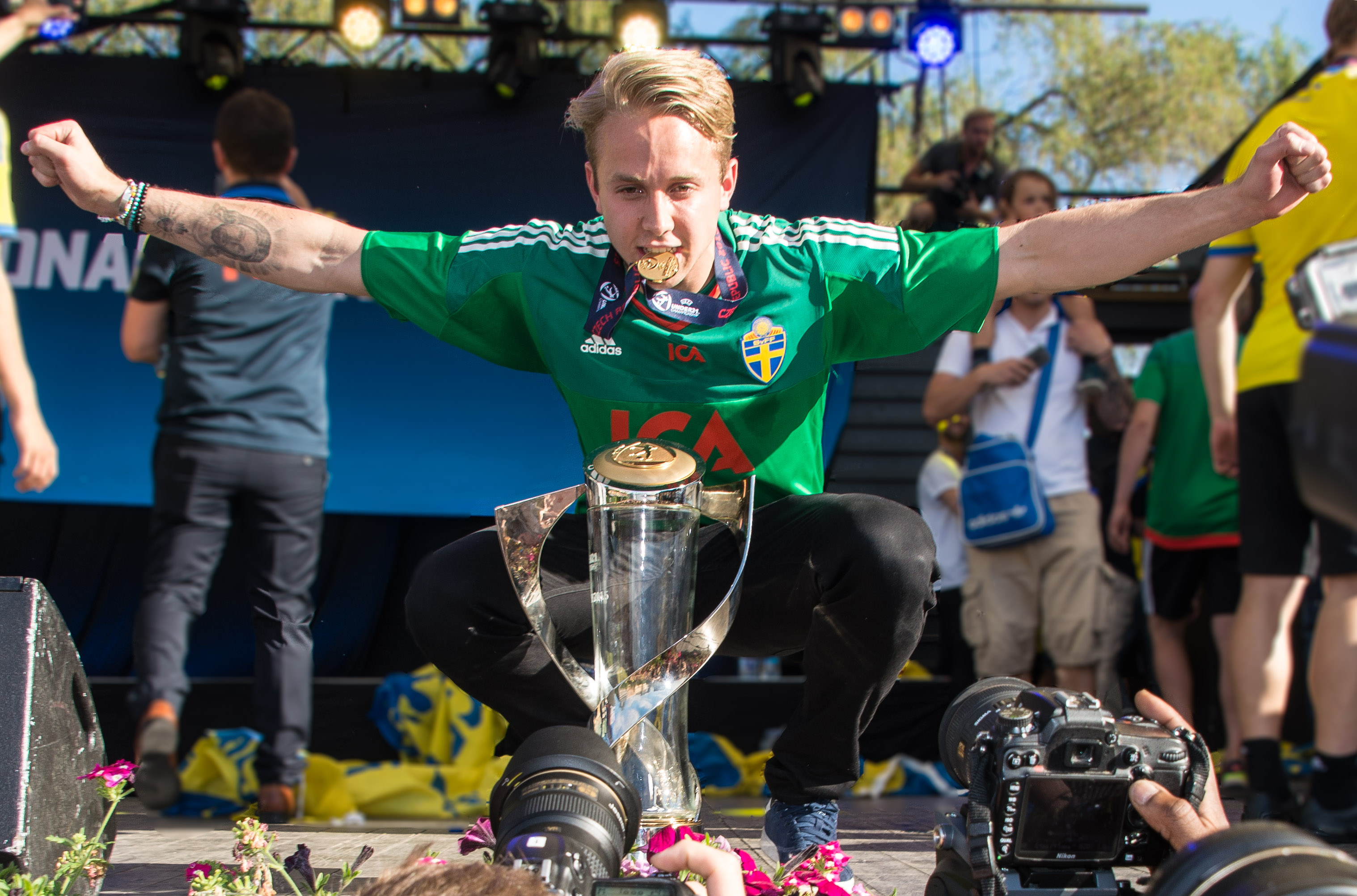 Patrik Carlgren och Sveriges U21-landslag blir firad i Kungsträdgården i Stockholm den 1 juli av 1000-tals fans efter guldet i U21-Europamästerskapet i fotboll 2015.